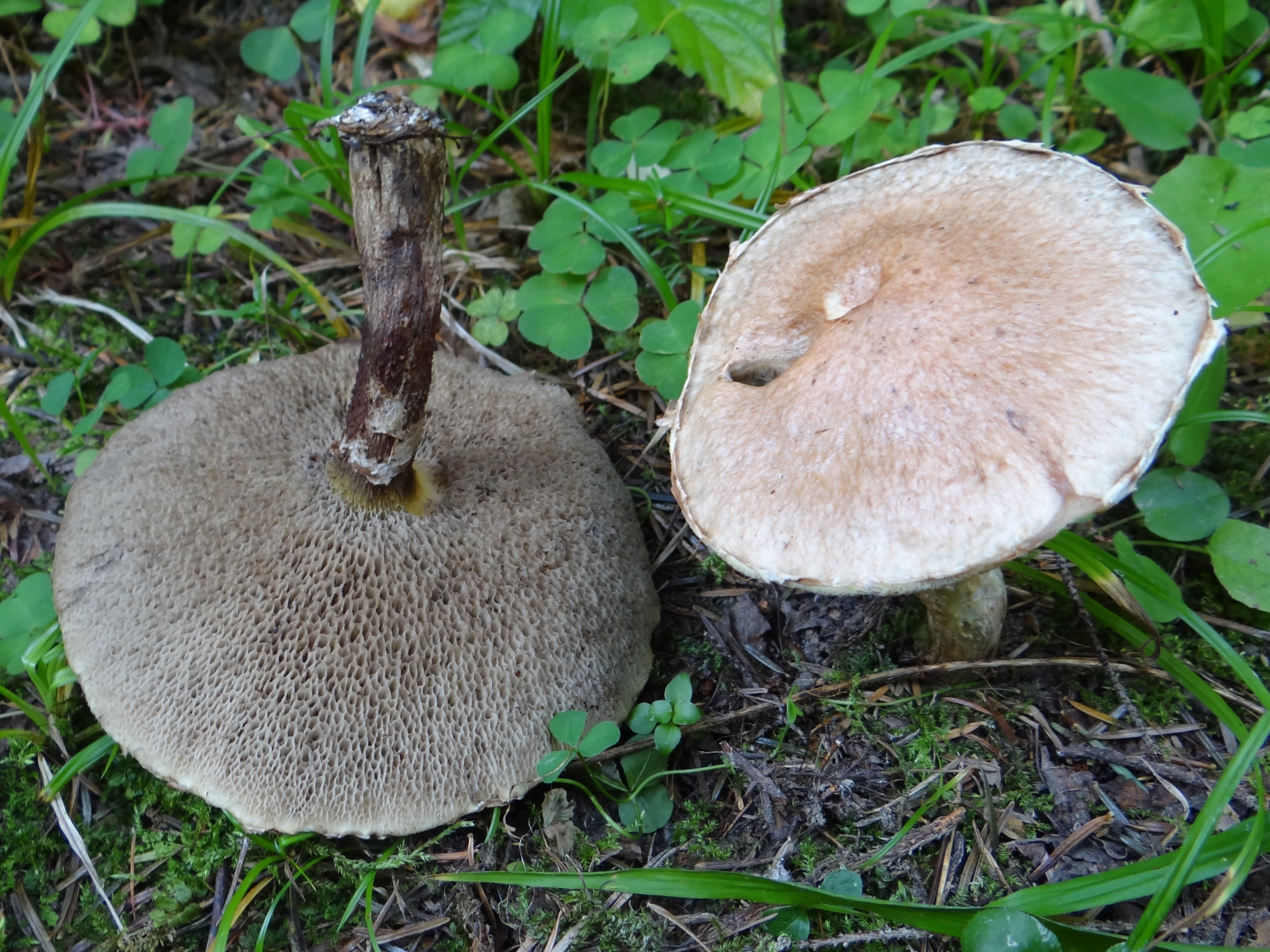 Suillus viscidus (location: Poland, Kamionna (województwo małopolskie)